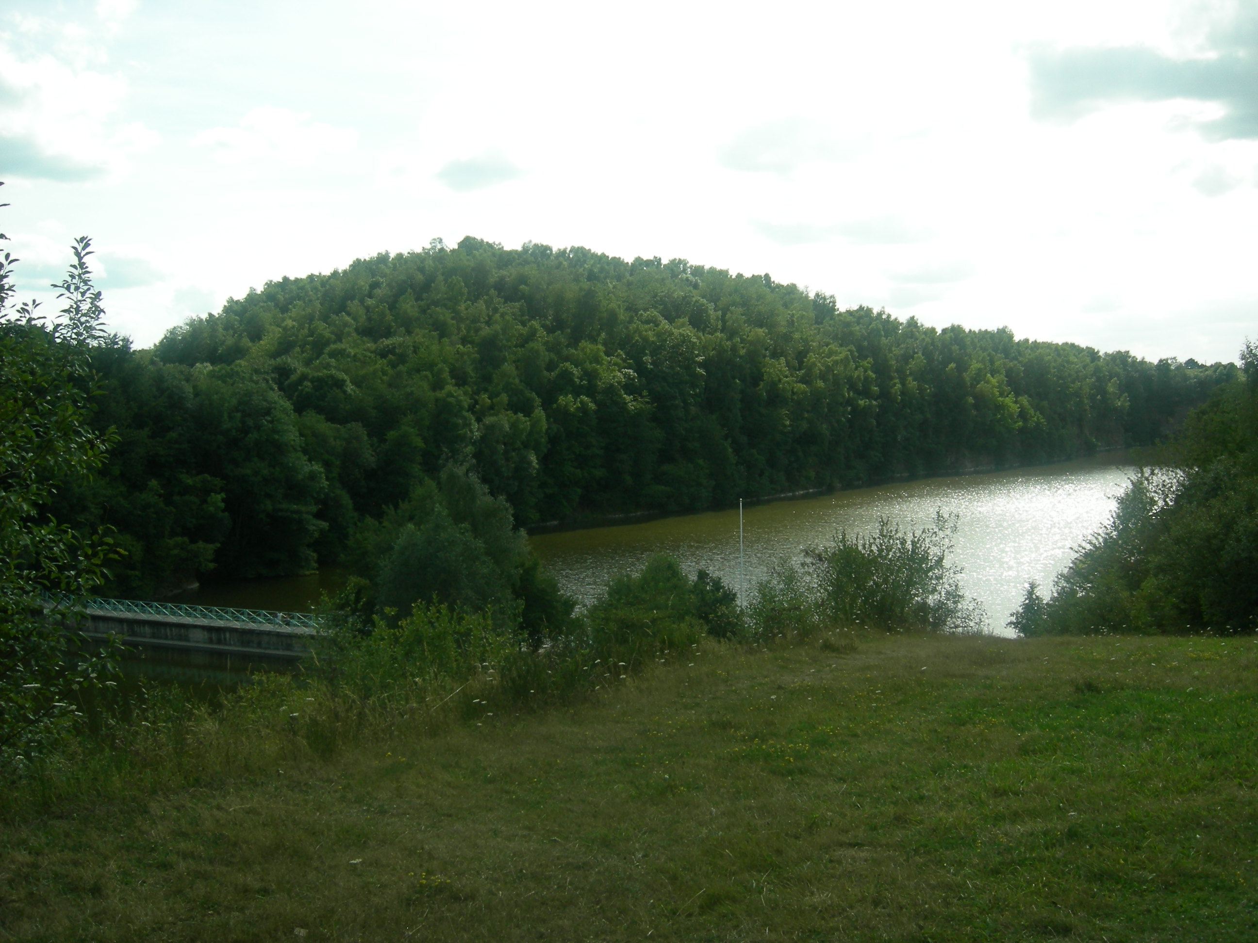 Le plan d'eau du Watissart, Jeumont